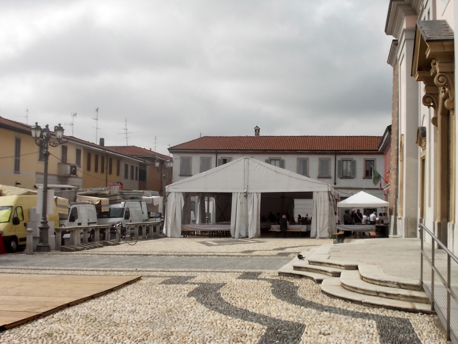 Arluno, il sagrato della chiesa con i preparativi della sagra della bùseca